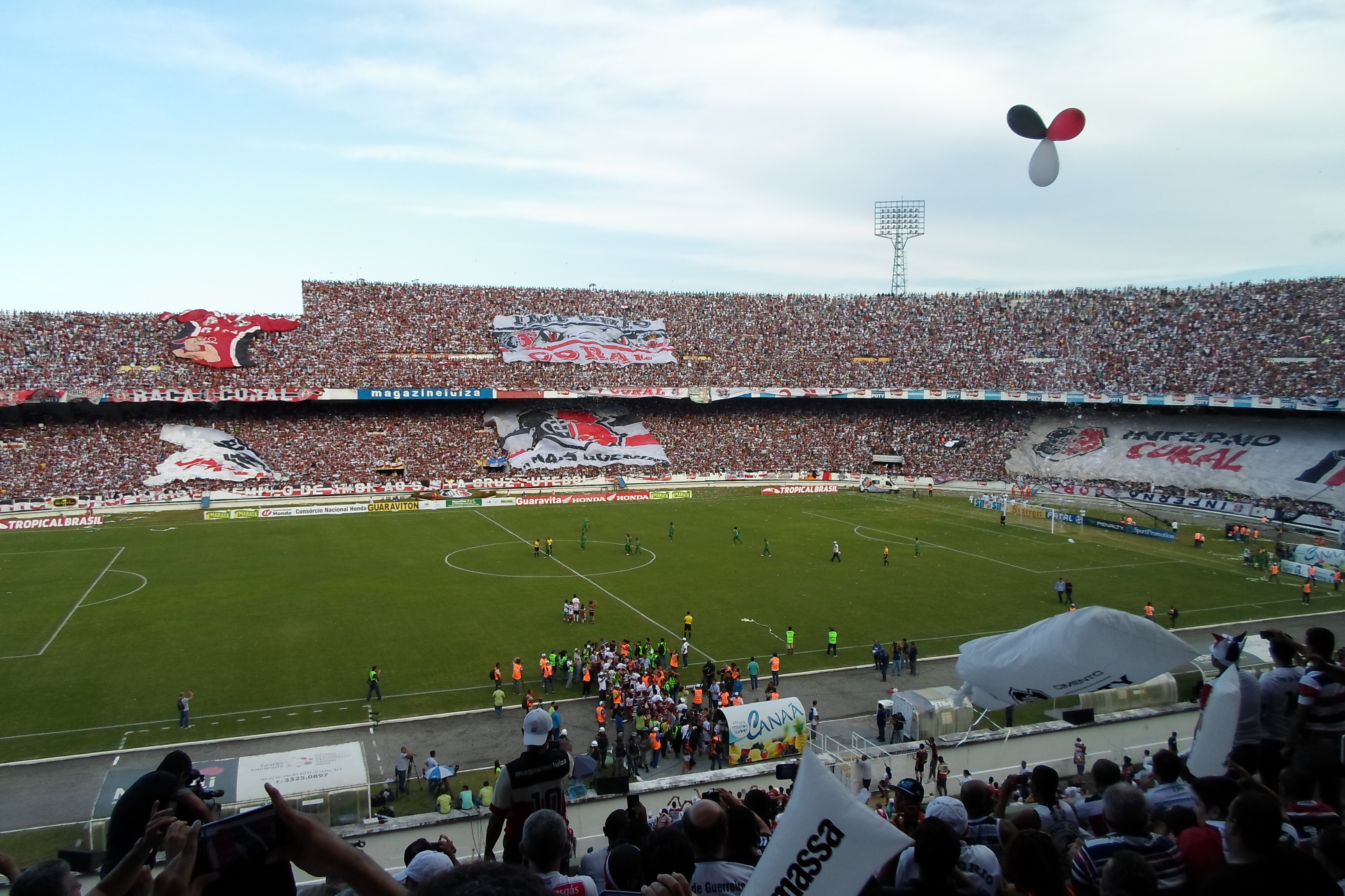 Estádio do Arruda durante a partida entre Santa Cruz e Betim, válida pela Série C do Campeonato Brasileiro de 2013.